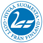 Hyvää Suomesta -merkki on suomalaisten pakattujen elintarvikkeiden alkuperämerkki